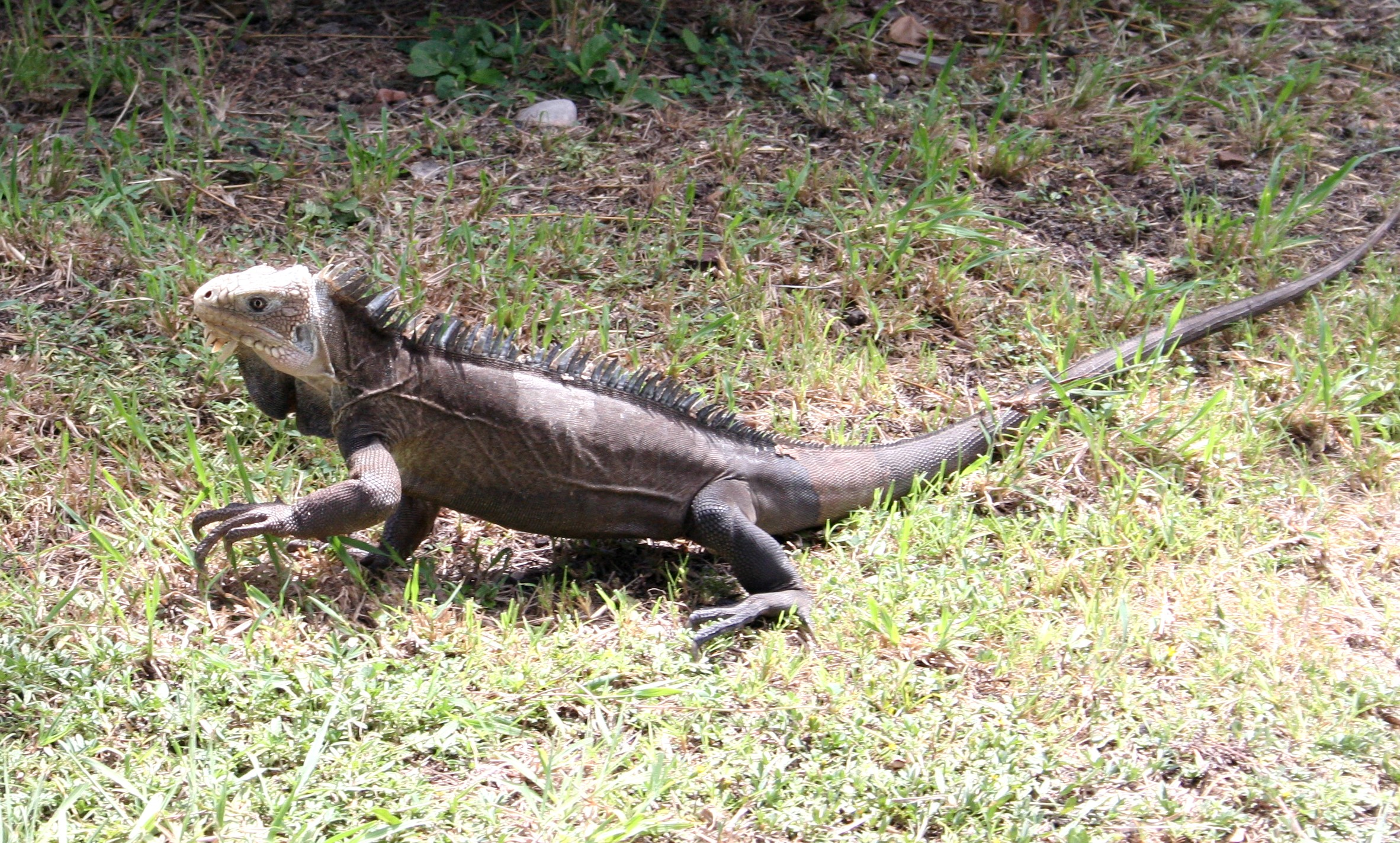 Iguana_delicatissima_-_La_Désirade